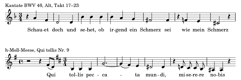 J.S. Bach, h-Moll-Messe BWV 232, Beginn des Qui tollis (Nr. 9) im Vergleich mit der Parodievorlage BWV 46 "Schauet doch und sehet ob irgend ein Schmerz sei"